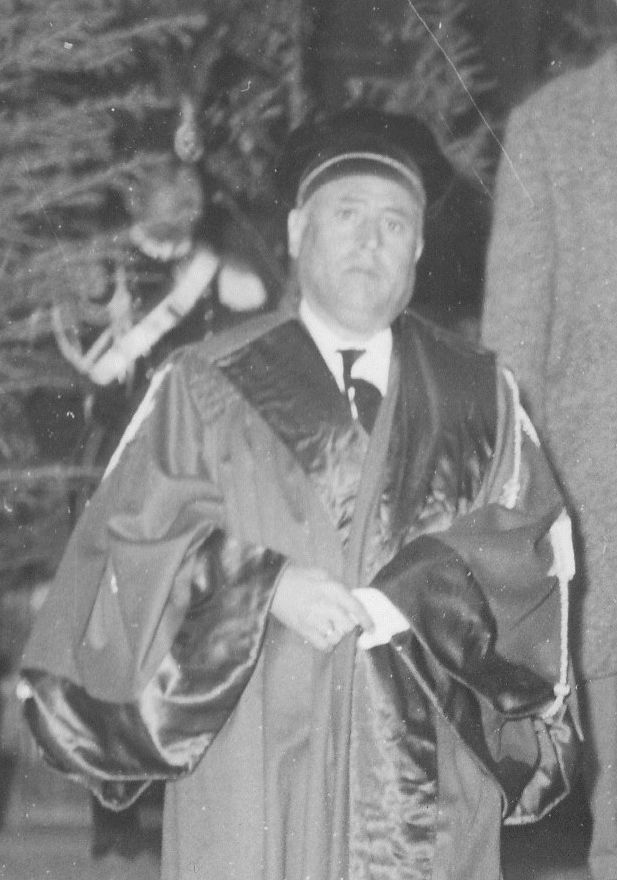 L'alto magistrato Filippo Romano durante l'inaugurazione dell'anno giudiziario del 1961